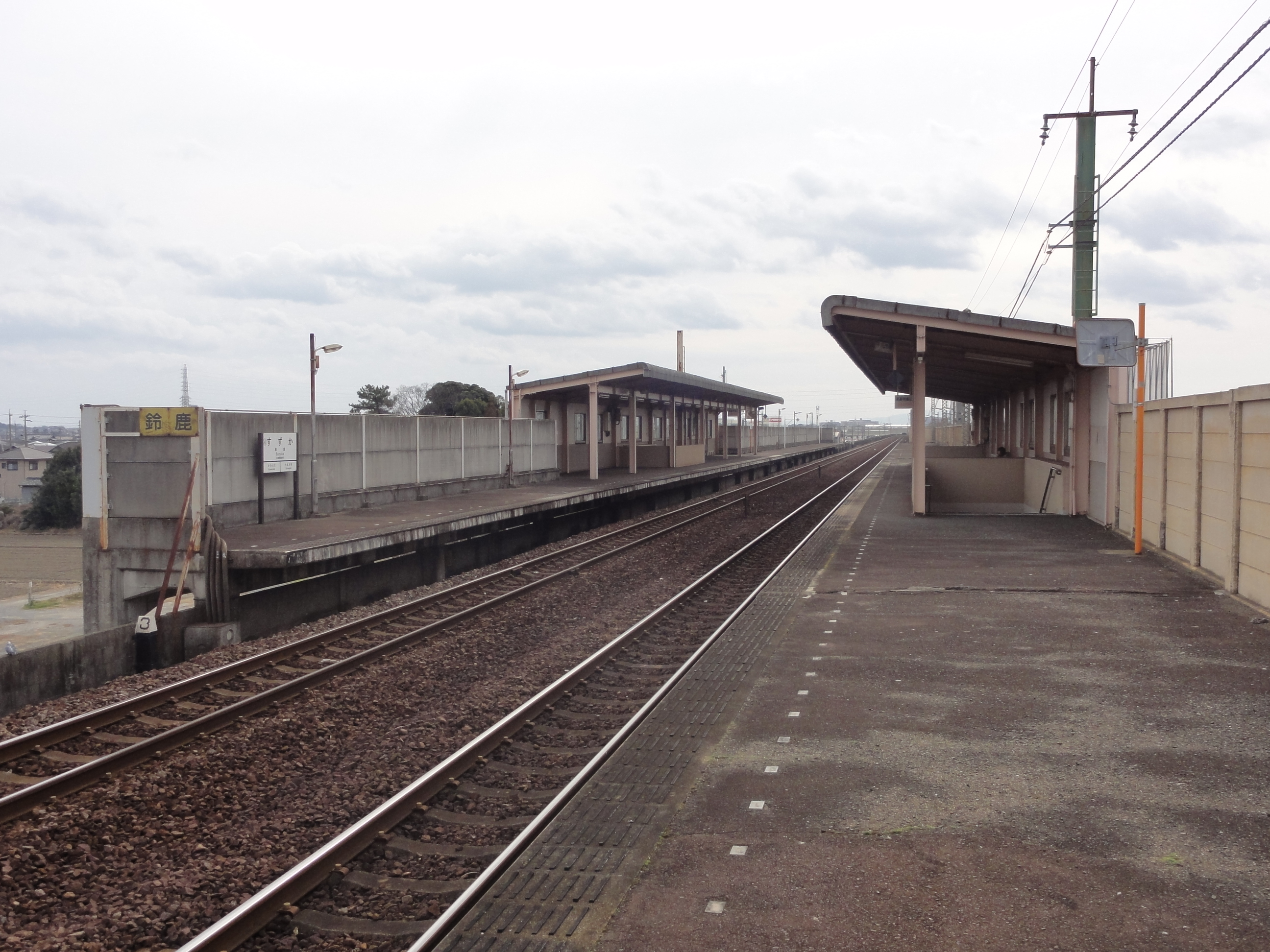 鈴鹿駅ホーム